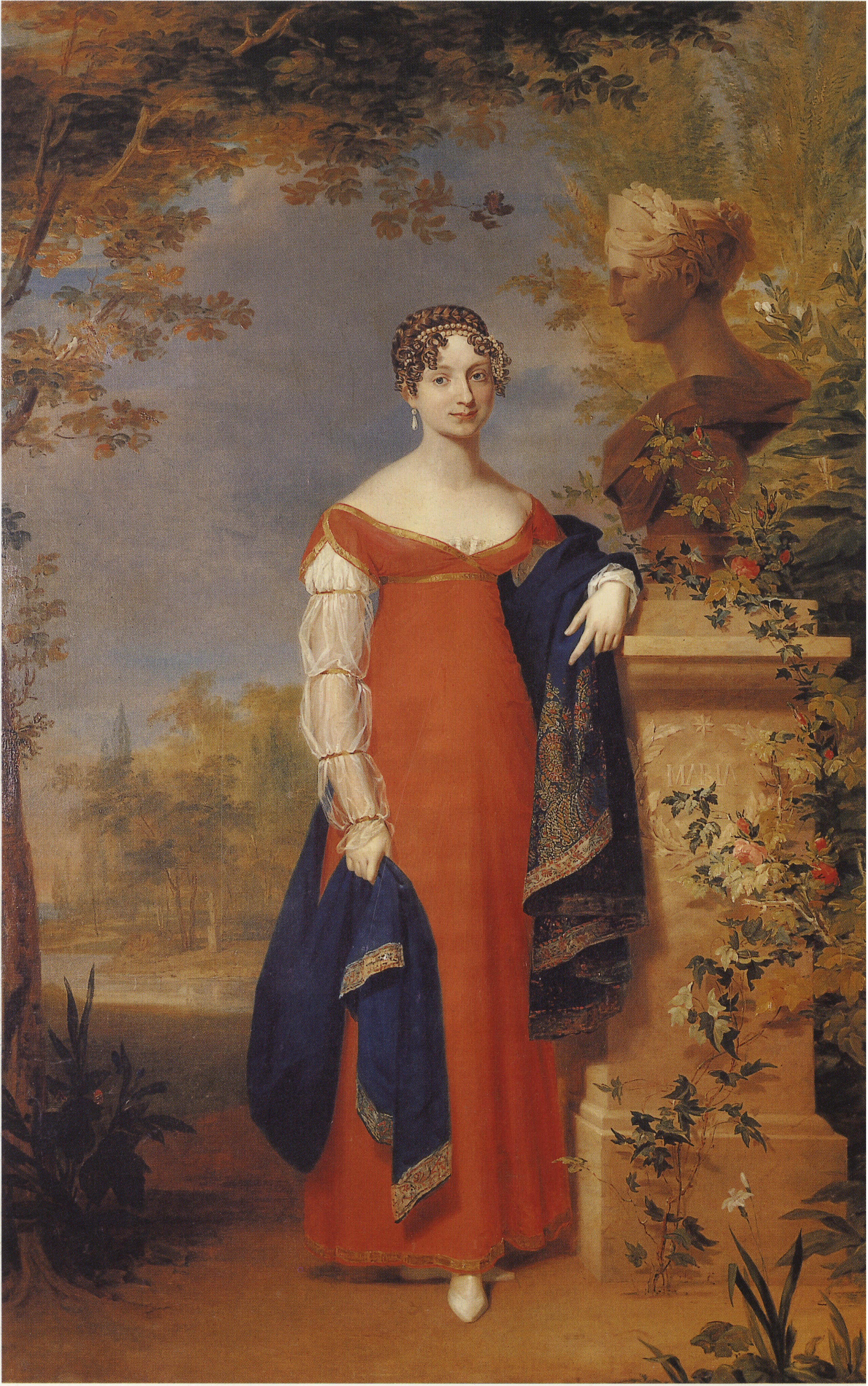 Великая Княгиня Анна Павловна. Музей-усадьба Останкино (Ж-224). Задуман, вероятно, как парный к портрету сестры Марии (Останкино, Ж-299). Надпись на постаменте бюста - MARIA